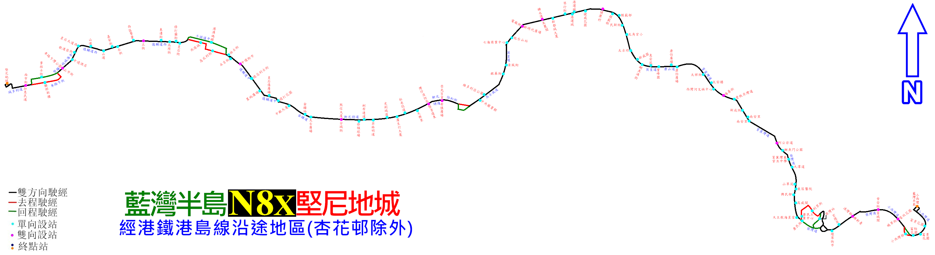 中文（香港）: 城巴N8X線的走線圖